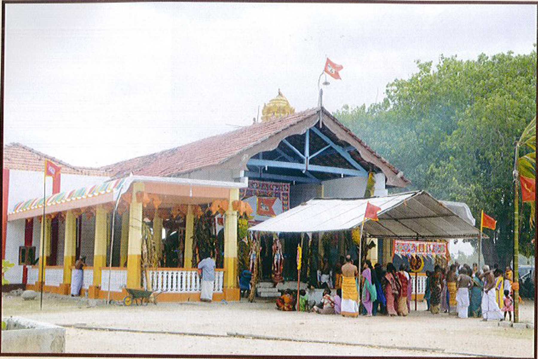 வேலணை சிற்பனை முருகன் ஆலயத்தின் முன் பக்க தோற்றம்